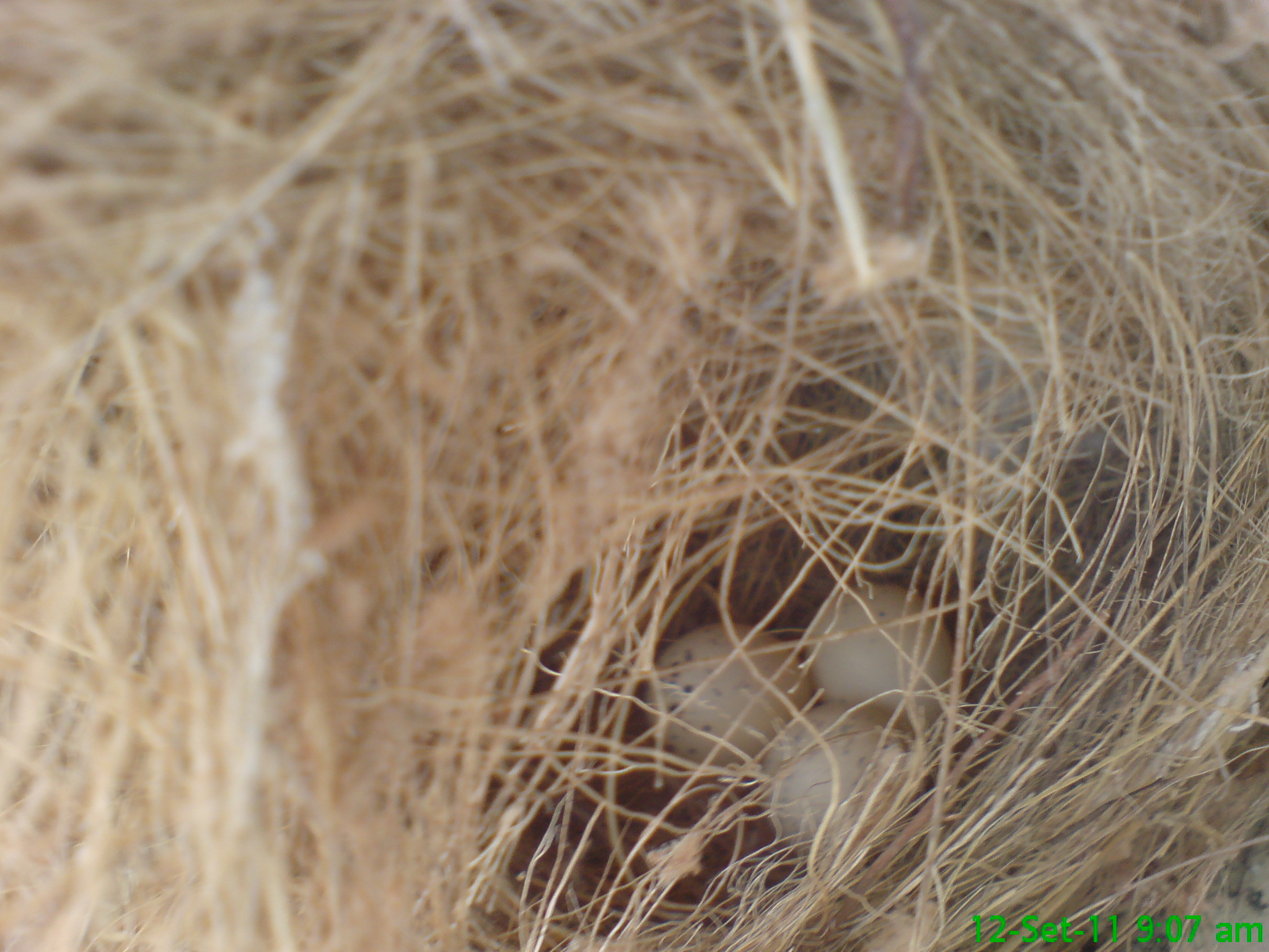 Tem pintas pretas como ovos de codorna.